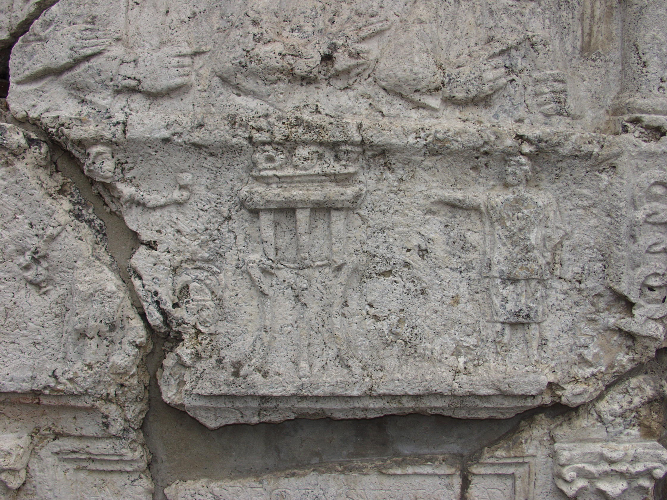 Aurelius Respectus síremléke – áldozati jelenet